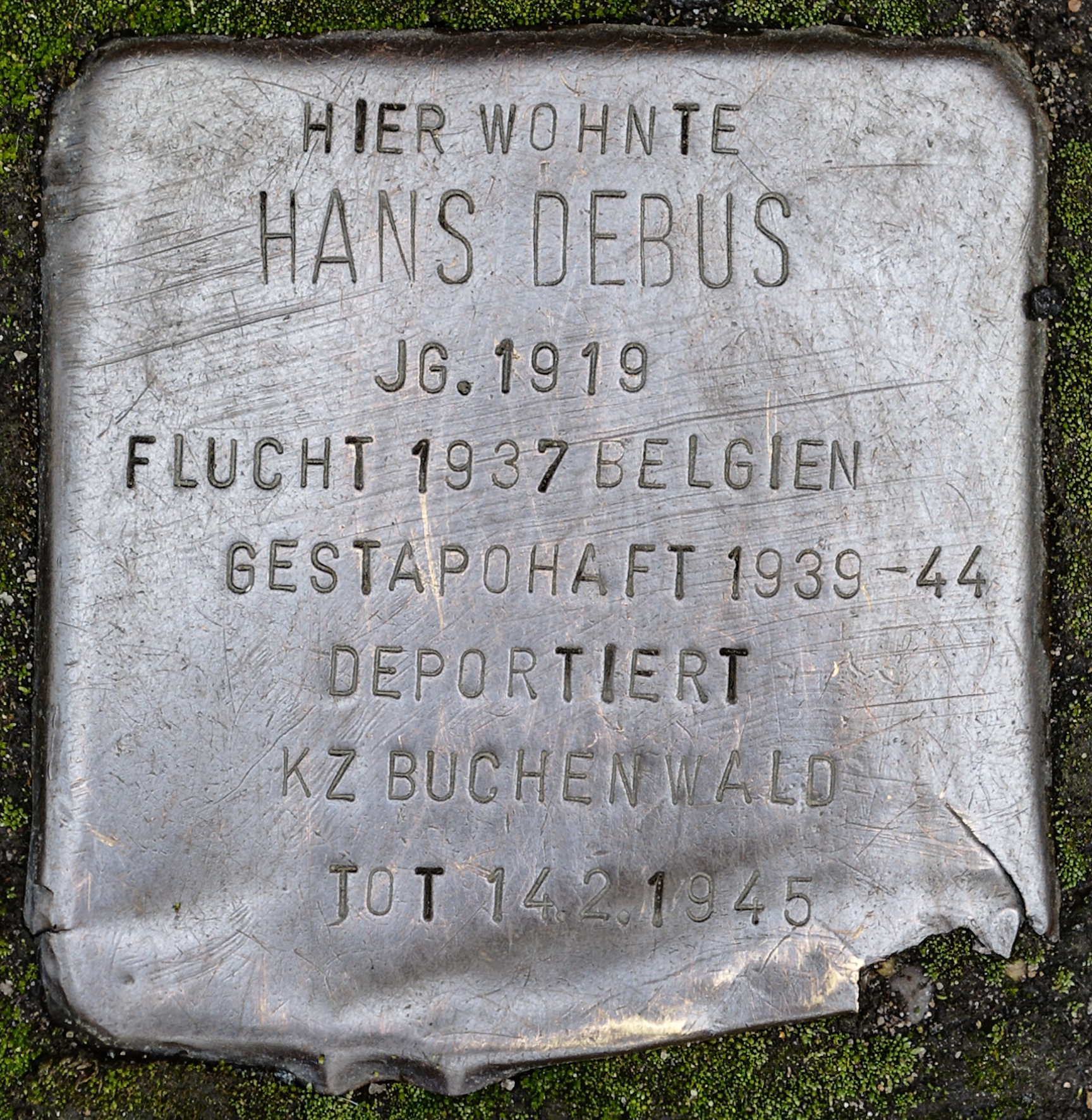 Stolpersteine in Solingen